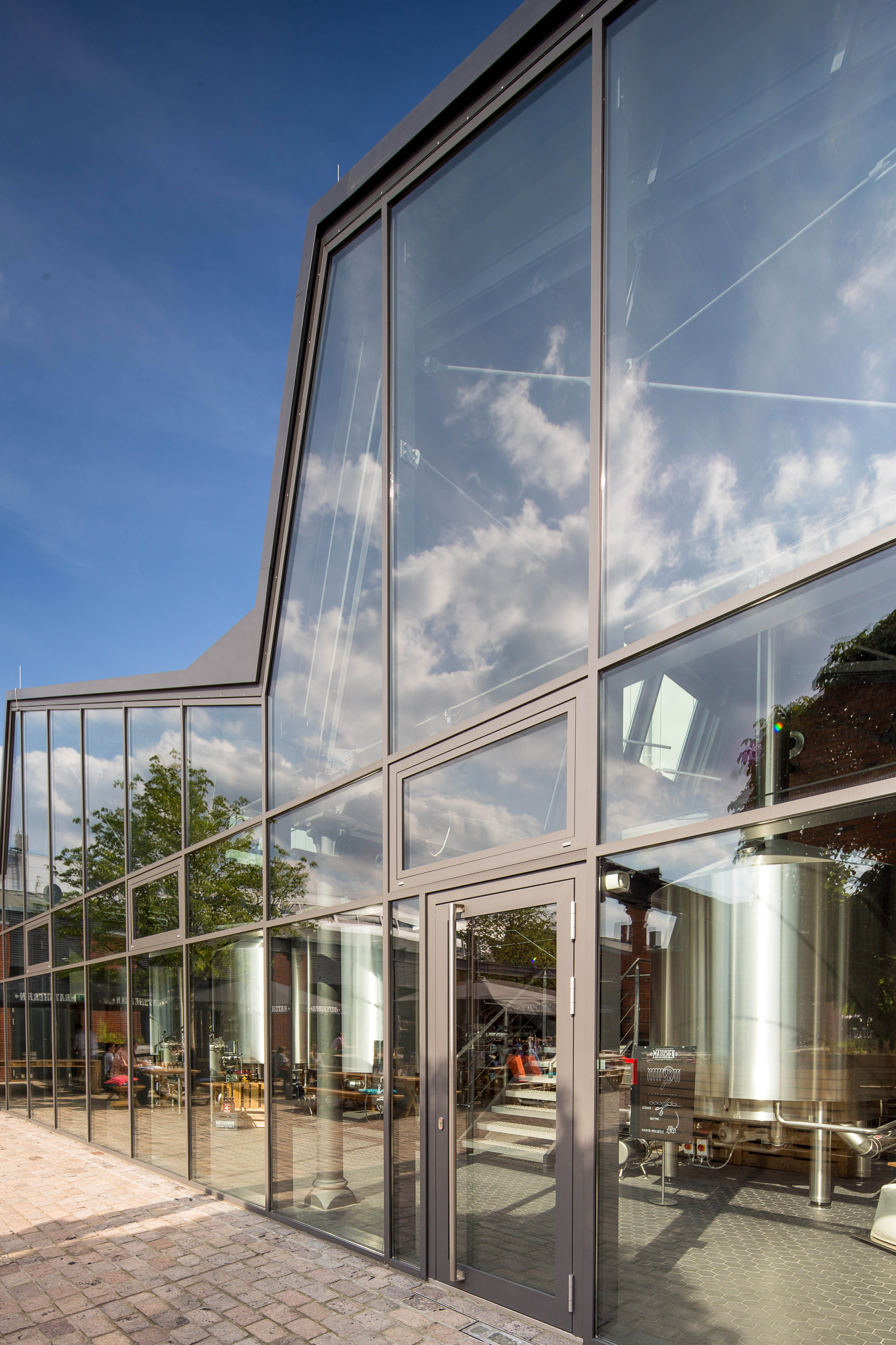 Ratsherrn Sudhaus